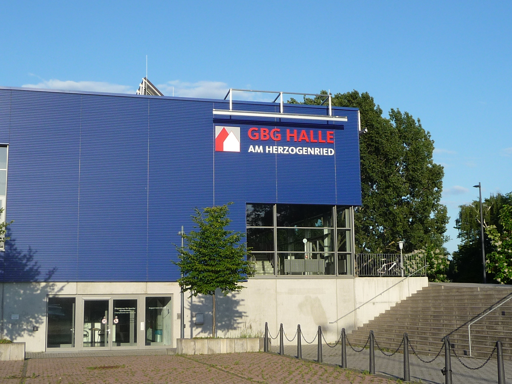 GBG-Halle am Herzogenriedpark